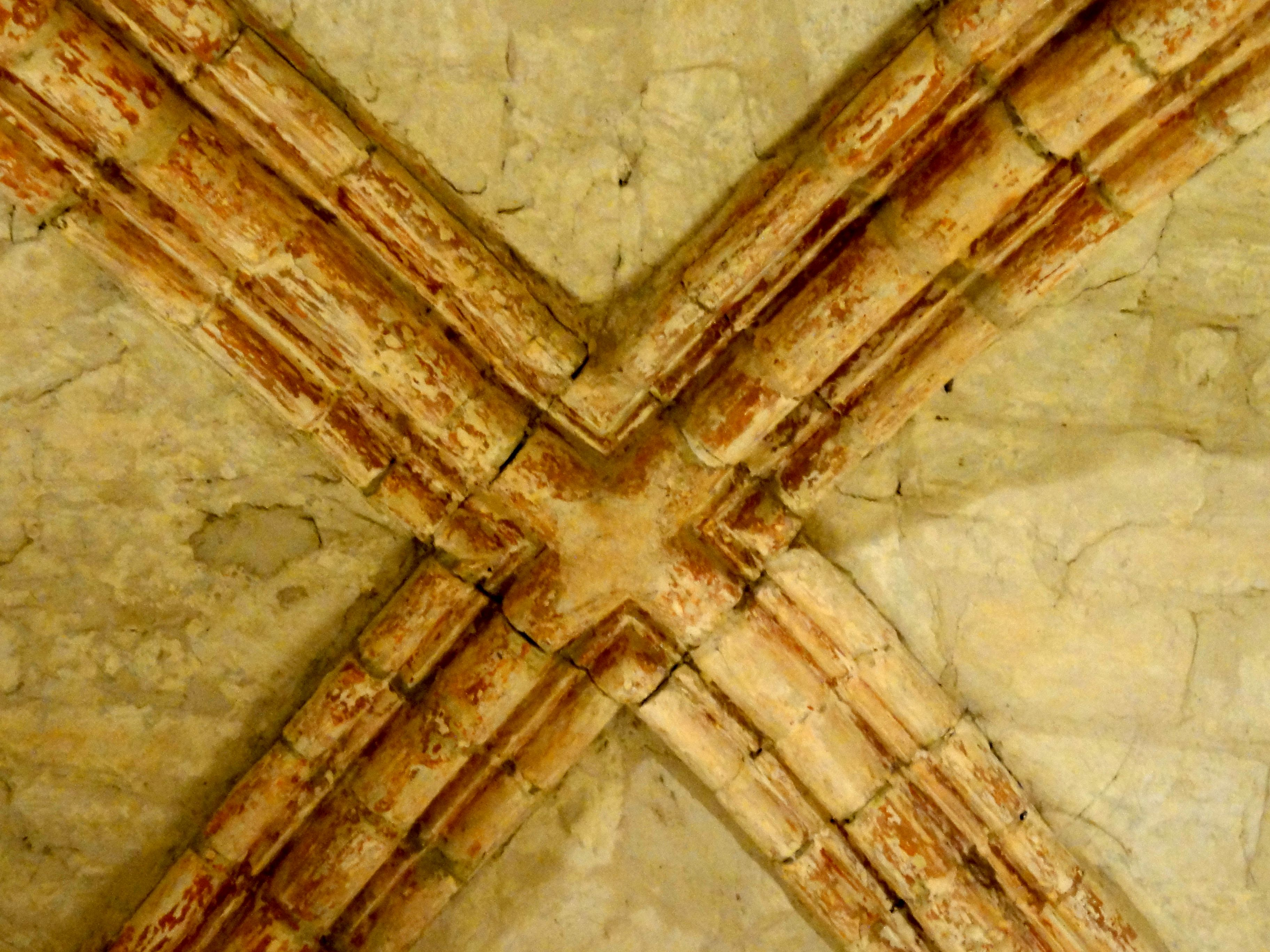 Chapelle sud, clé de voûte.